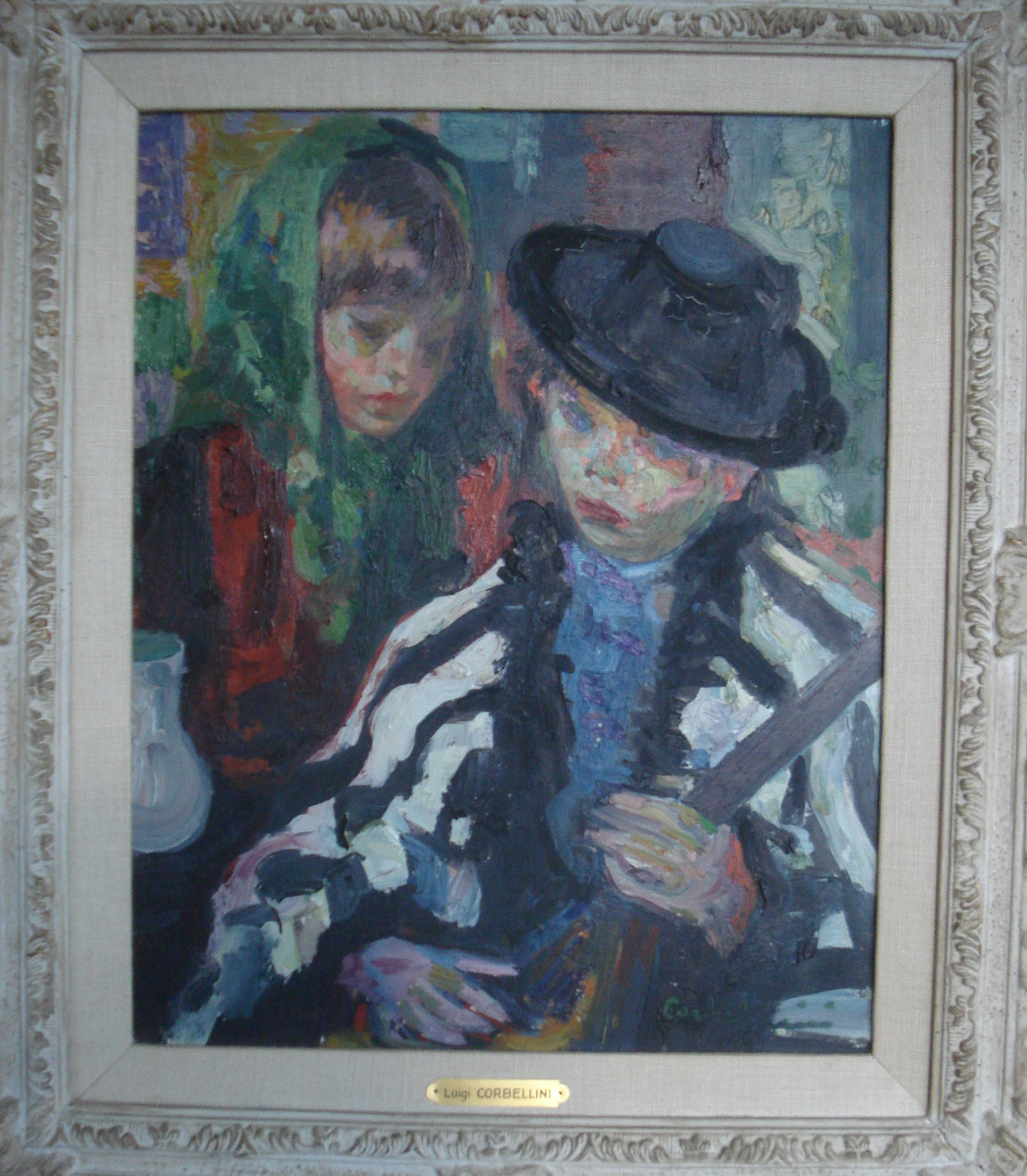 Une des spécialités du peintre Luigi Corbellini, les enfants.